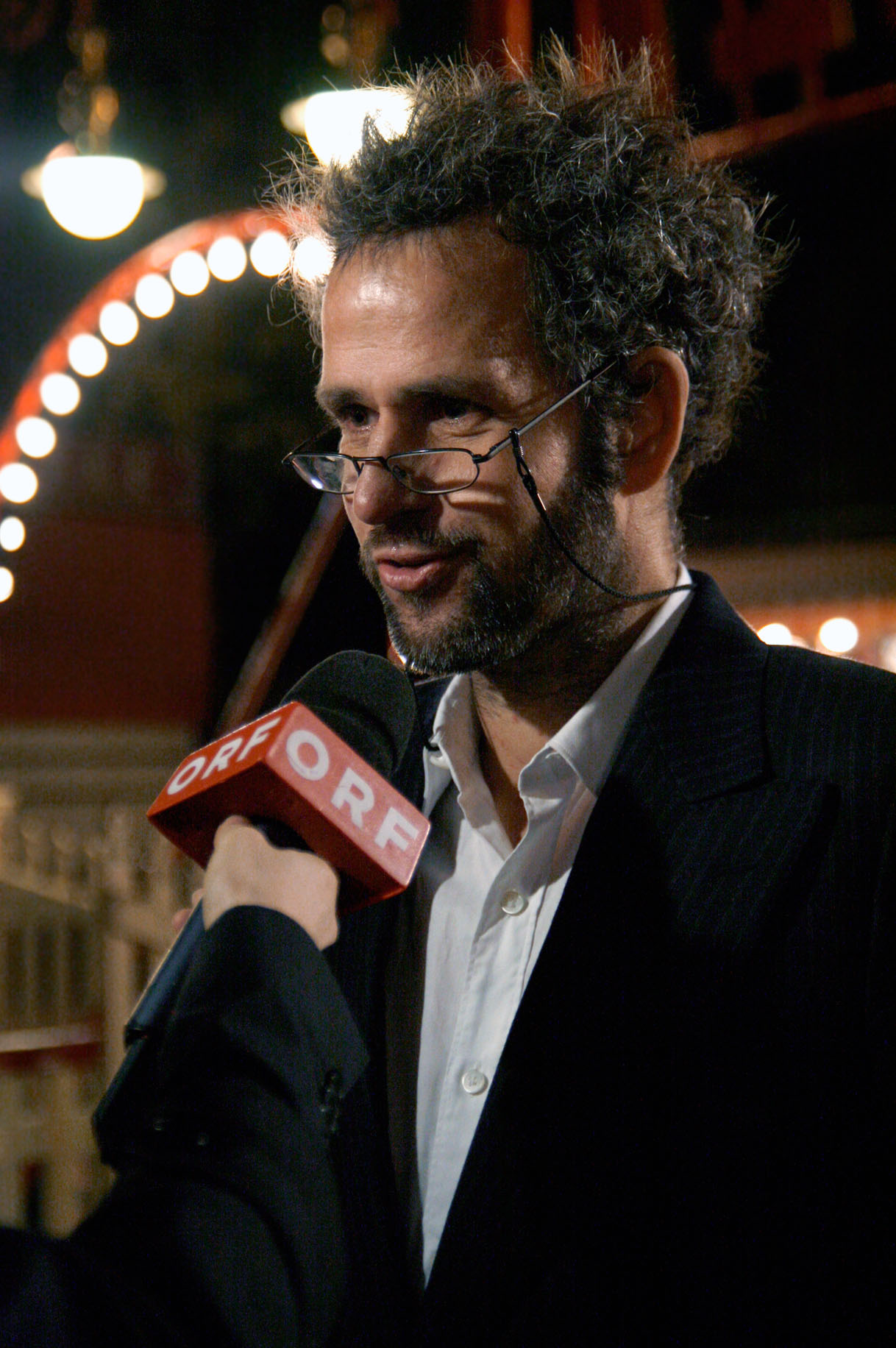 Christoph Schlingensief während der Verleihung des Nestroy-Theaterpreises 2009 (Circus Roncalli auf dem Wiener Rathausplatz).